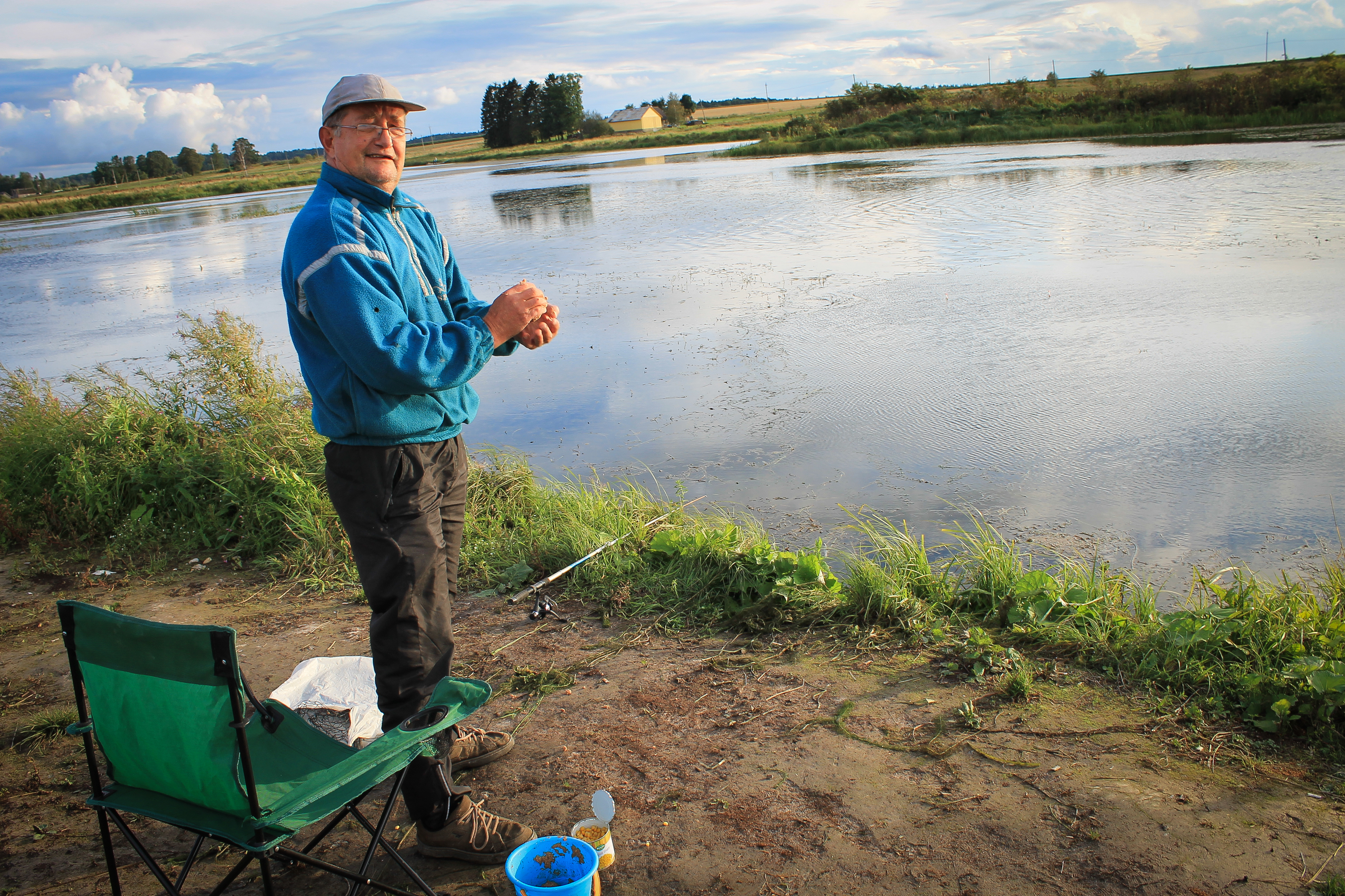 Kadrina paisjärv kuival suvel.